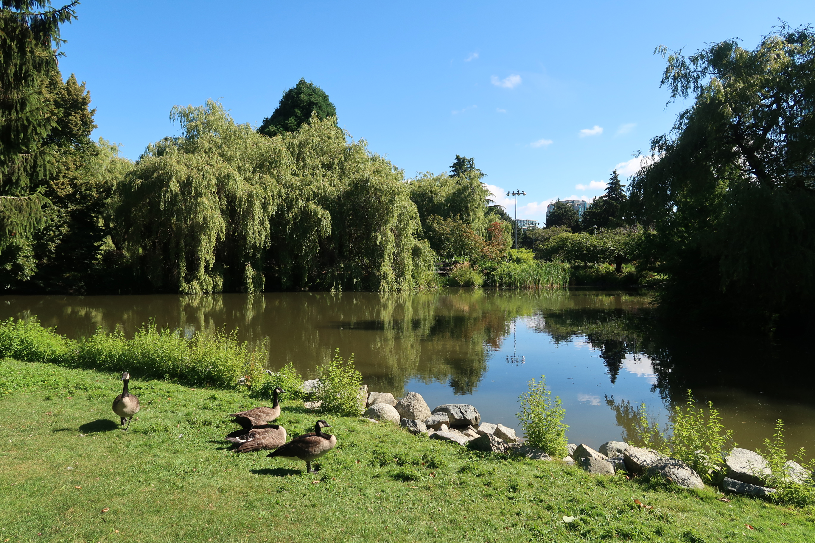 Minoru Park Pond